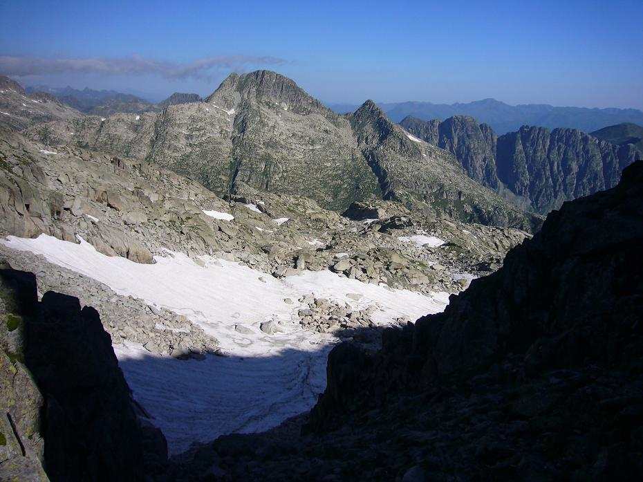 Tossau de Mar vist des de la Bretxa de Pauss; la Vall de Boí, Alta Ribagorça, Catalunya